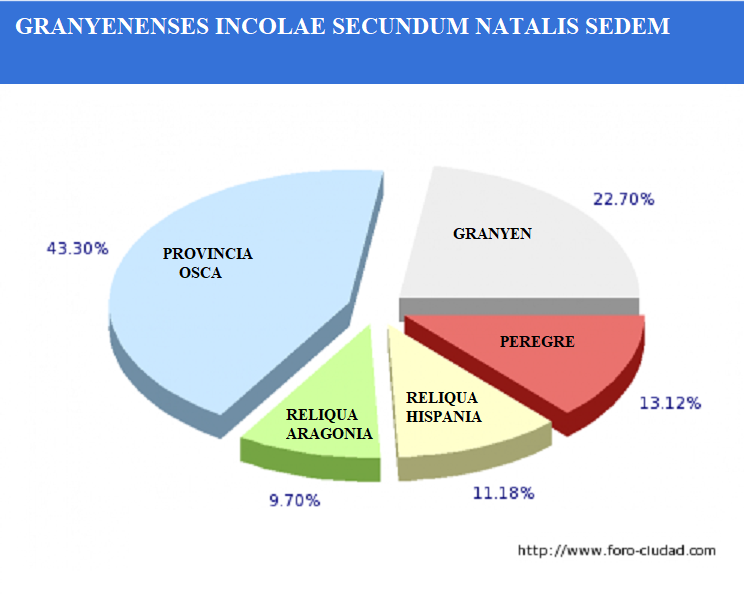 Granyenenses incolae secundum natalis sedem